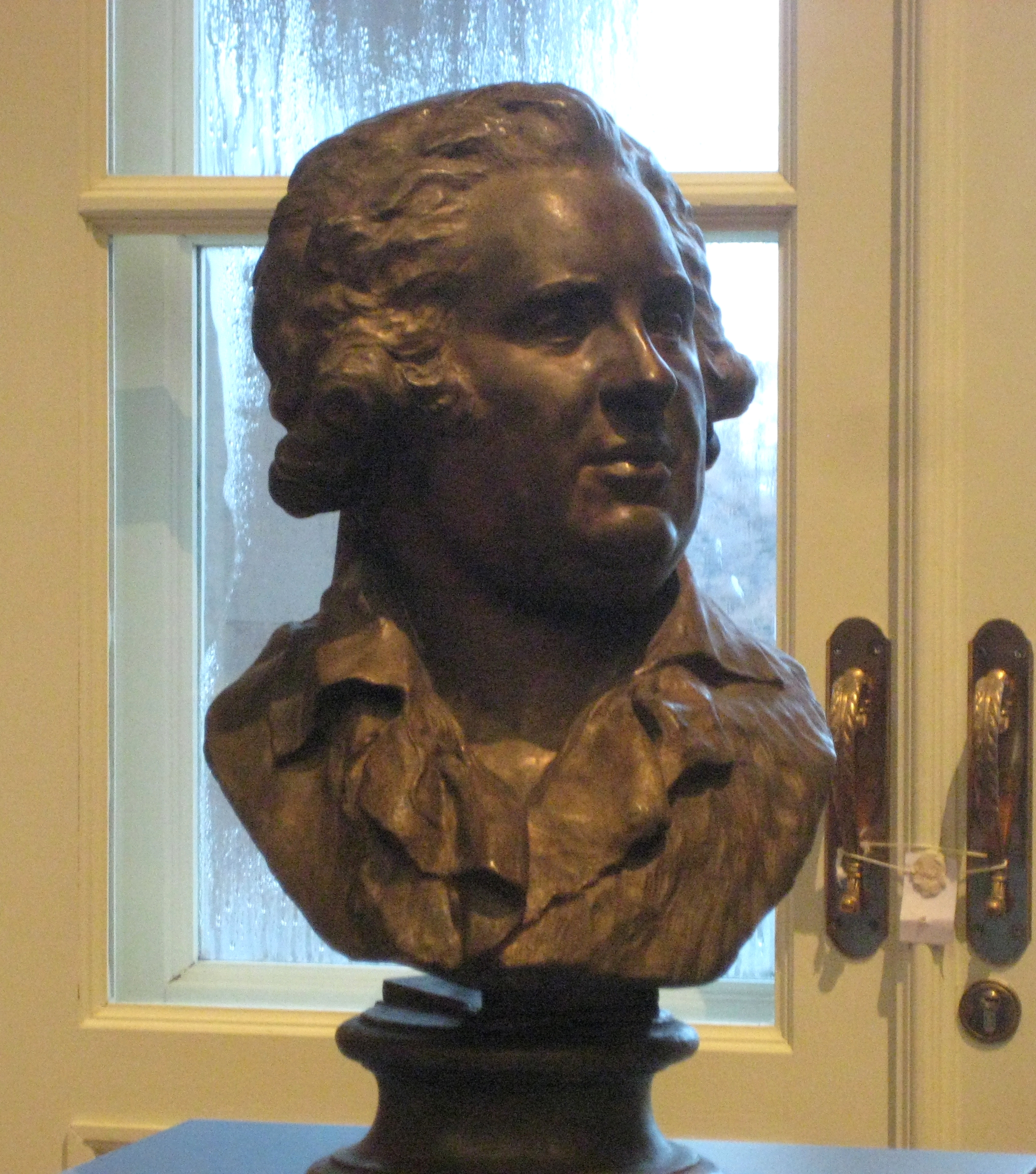 Александр Безбородко. Бюст работы Ф. Шубина. Выставка "Павел I", Царицыно, 2011